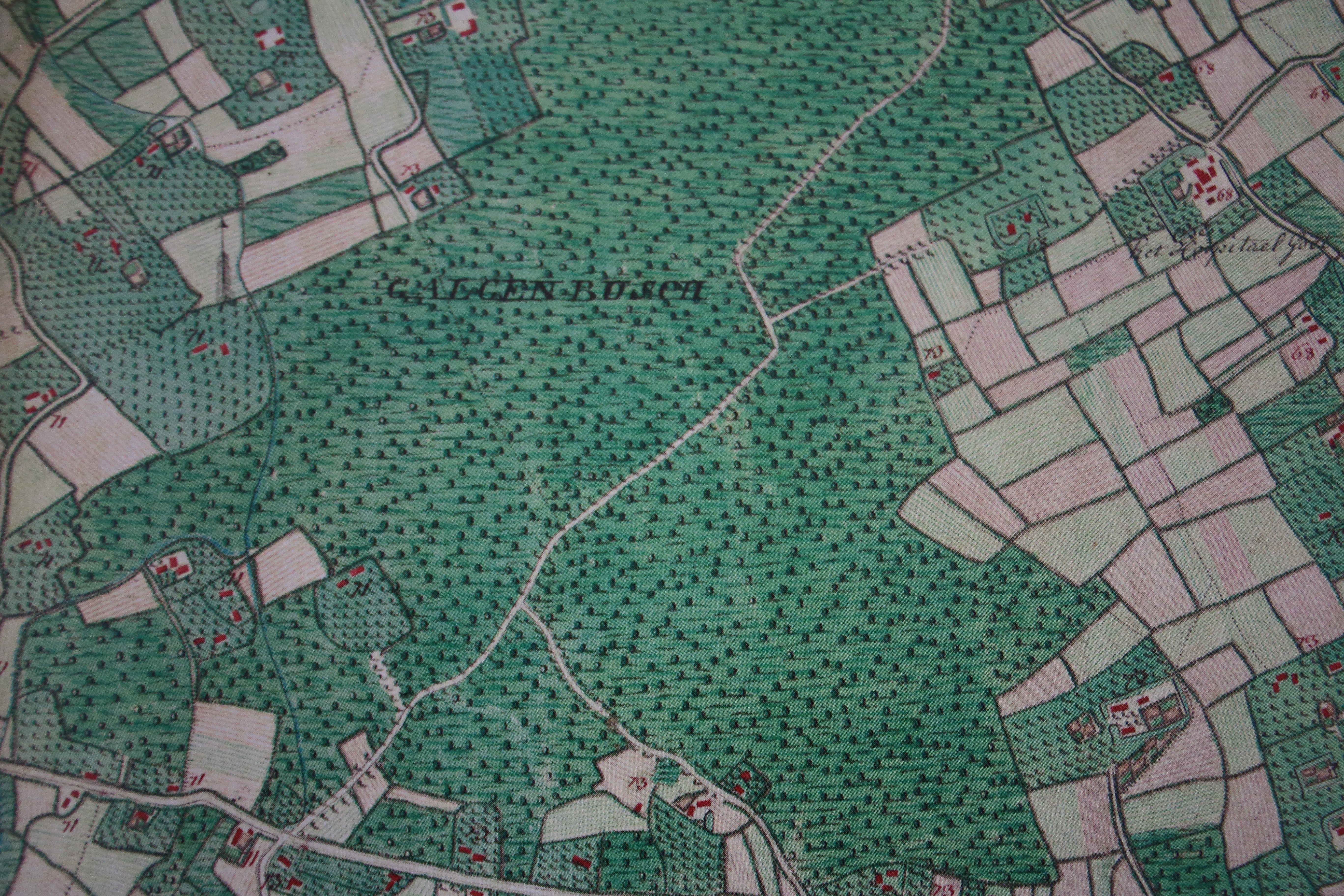 Galgebossen Ferraris